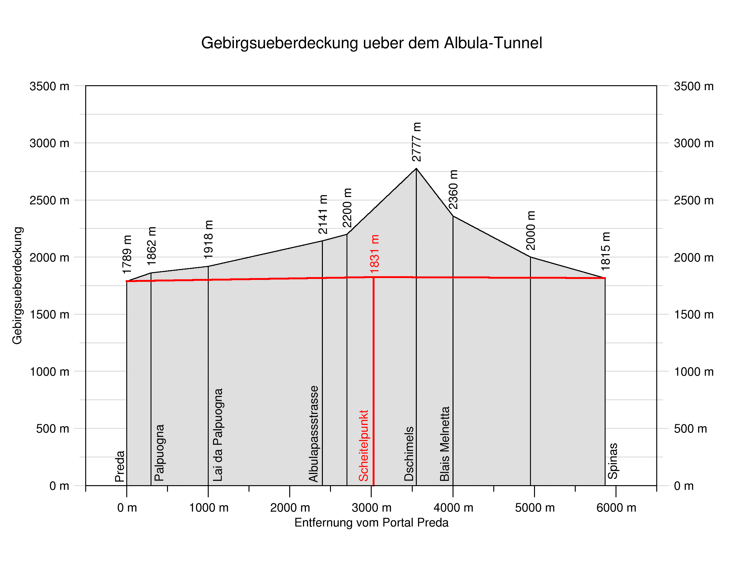 Gebirgsüberlagerung über dem Albula-Eisenbahntunnel in der Schweiz